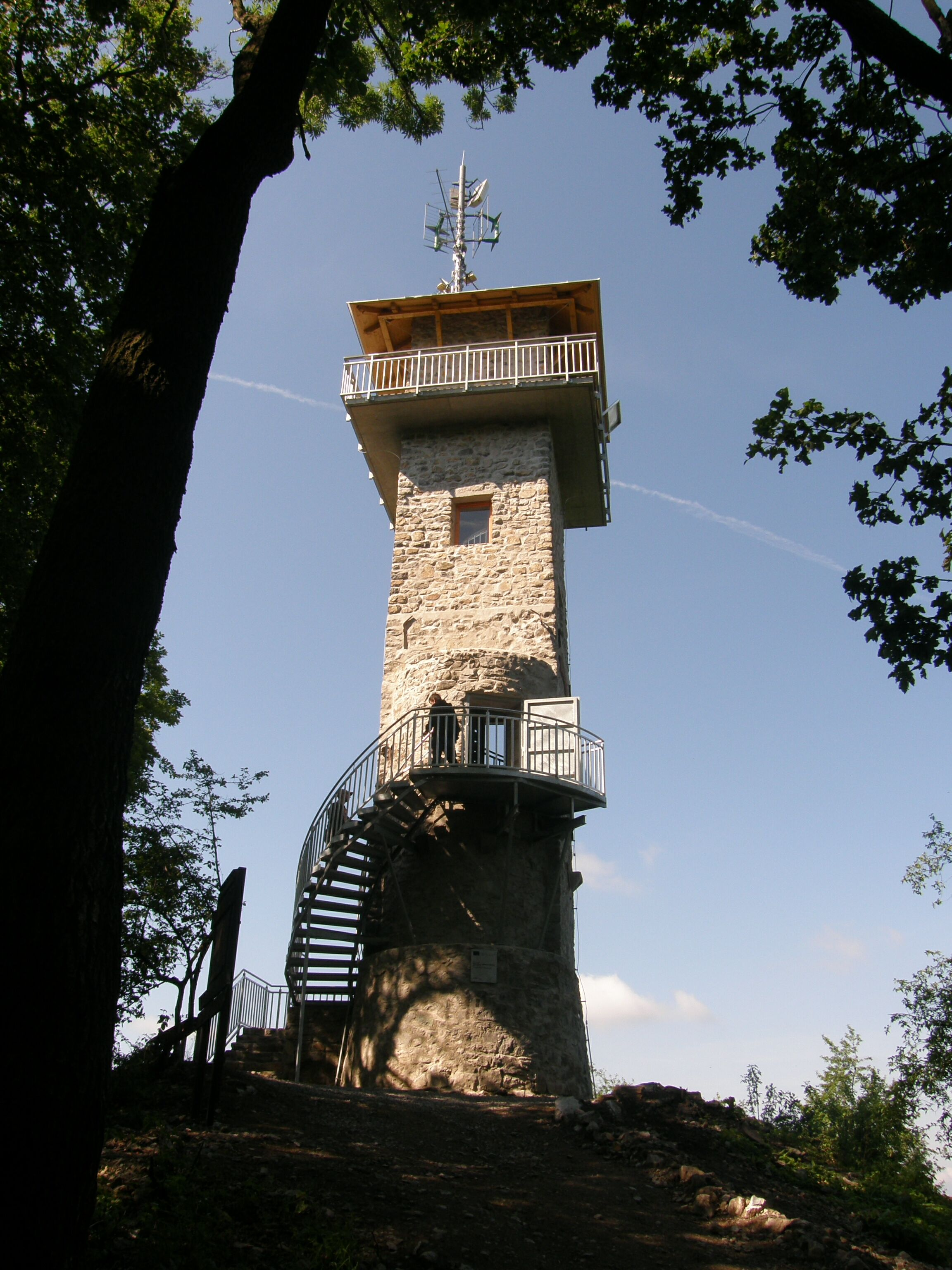 Alexandrova věž po rekonstrukci